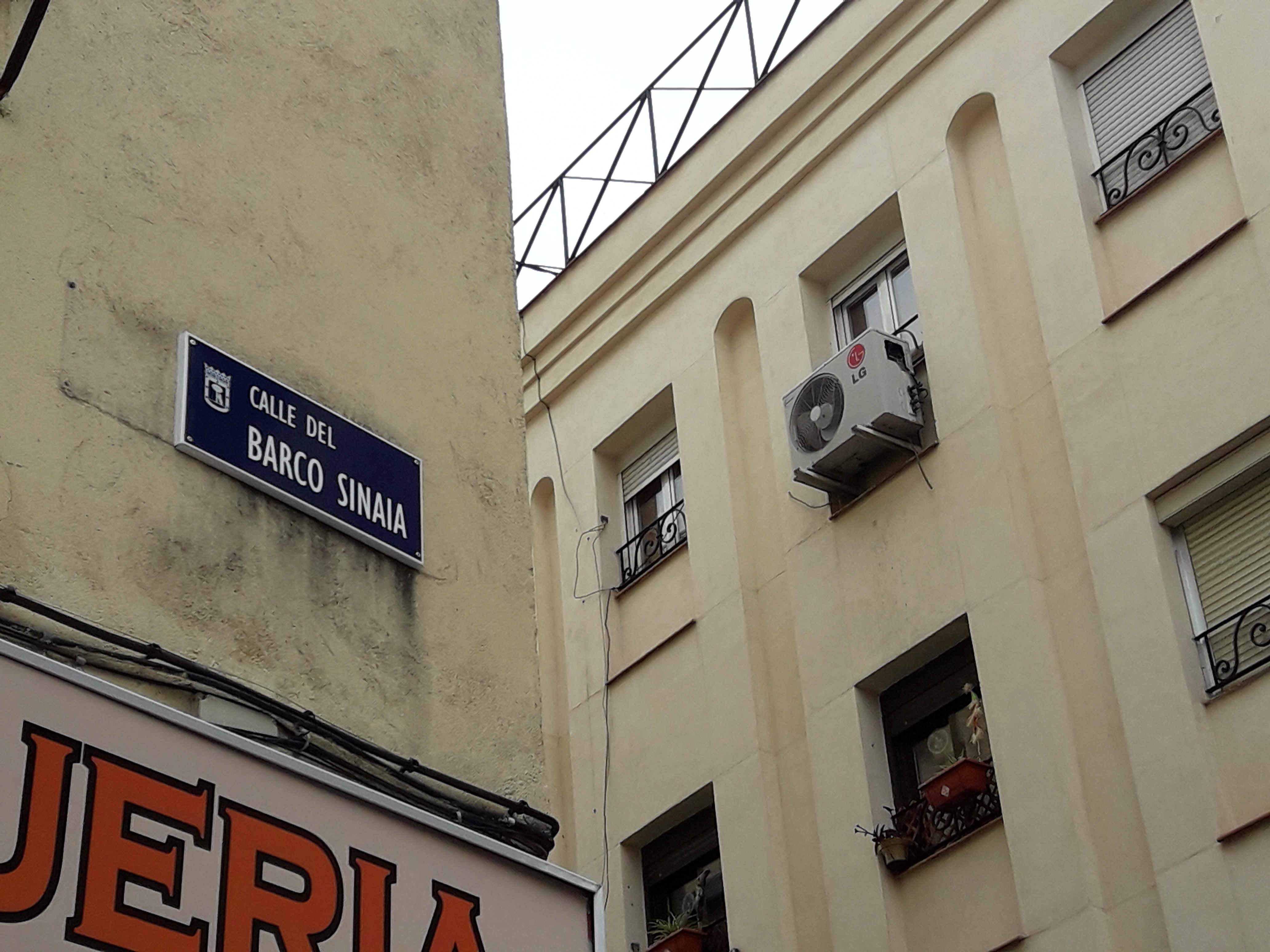 Con las recomendaciones realizadas por el Comisionado de la Memoria Histórica, el Pleno del Ayuntamiento de Madrid, en la sesión extraordinaria celebrada en abril de 2017, aprobó el cambio de denominación de calles, plazas y espacios públicos de la ciudad en las que se conmemoraba la sublevación militar, la Guerra Civil Española o la represión de la dictadura del General Franco. Tras el auto del Tribunal Superior de Justicia de Madrid, que desestimaba medidas cautelares contra este Acuerdo Plenario, el cambio de nombres en el callejero se ha hecho posible.